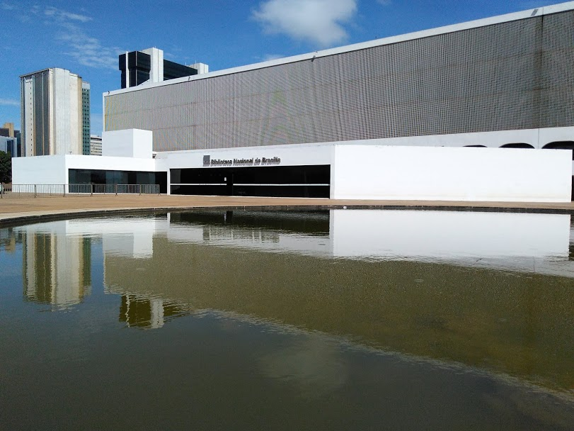 Espejos de agua